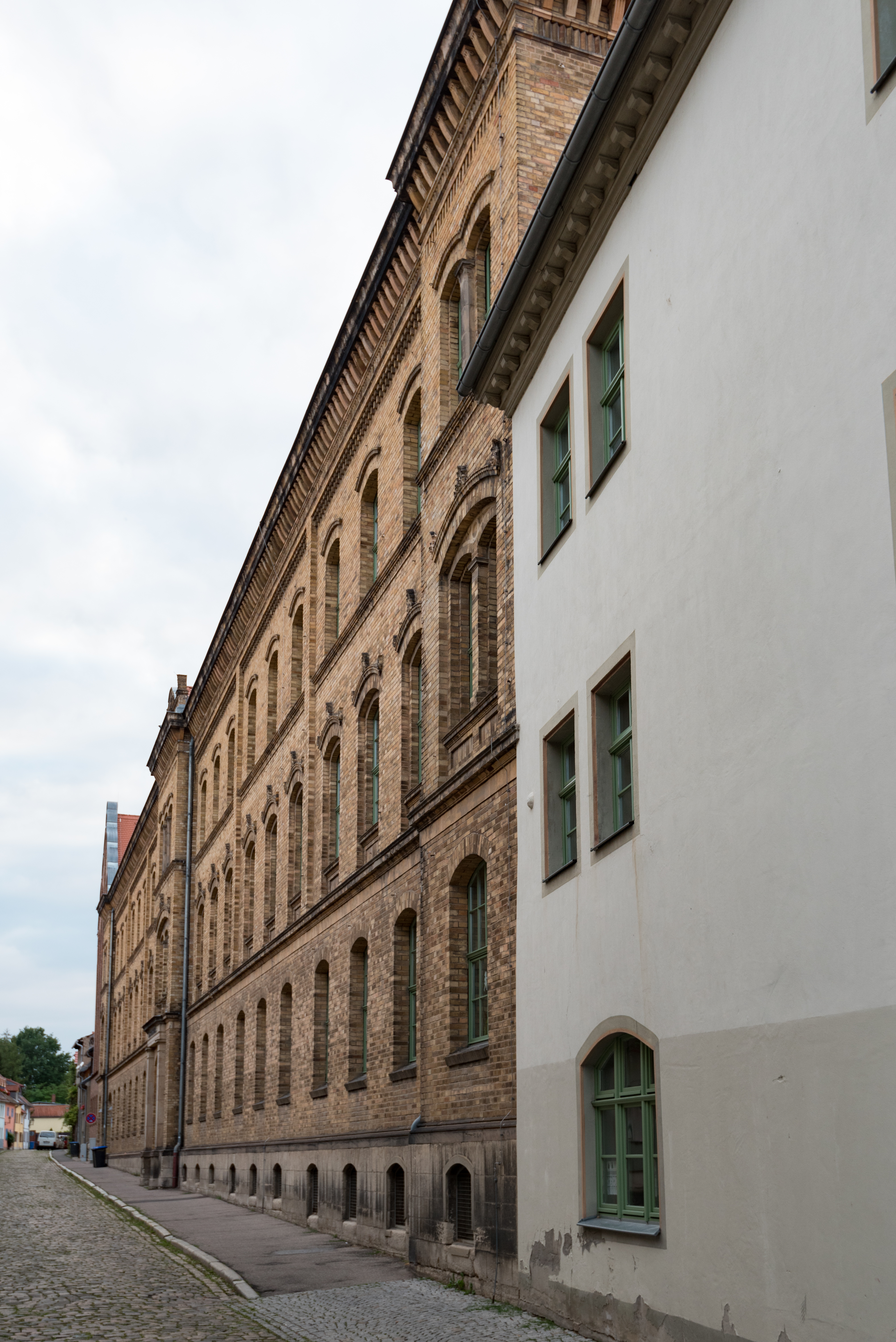 Naumburg (Saale), Schulstraße 1